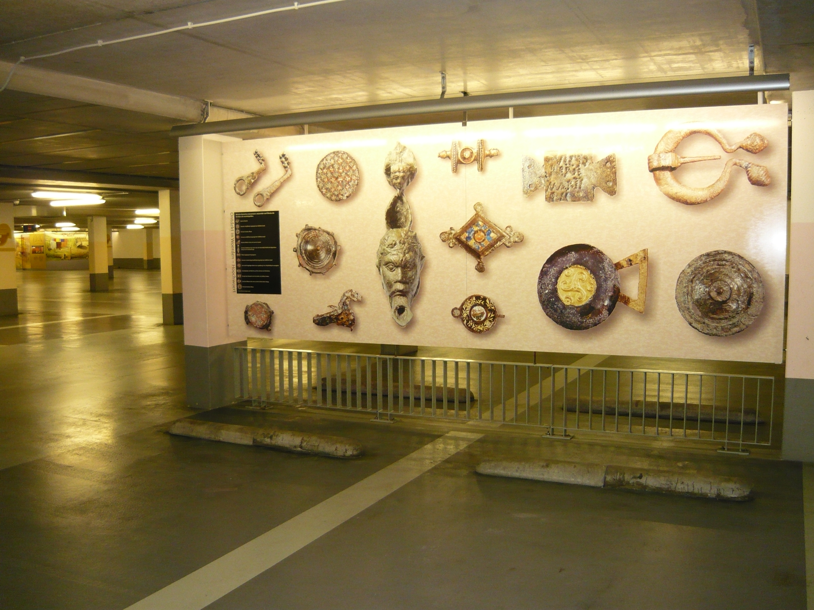 parkeergarage Castellum te Woerden met foto's van Romeinse vondsten in die plaats